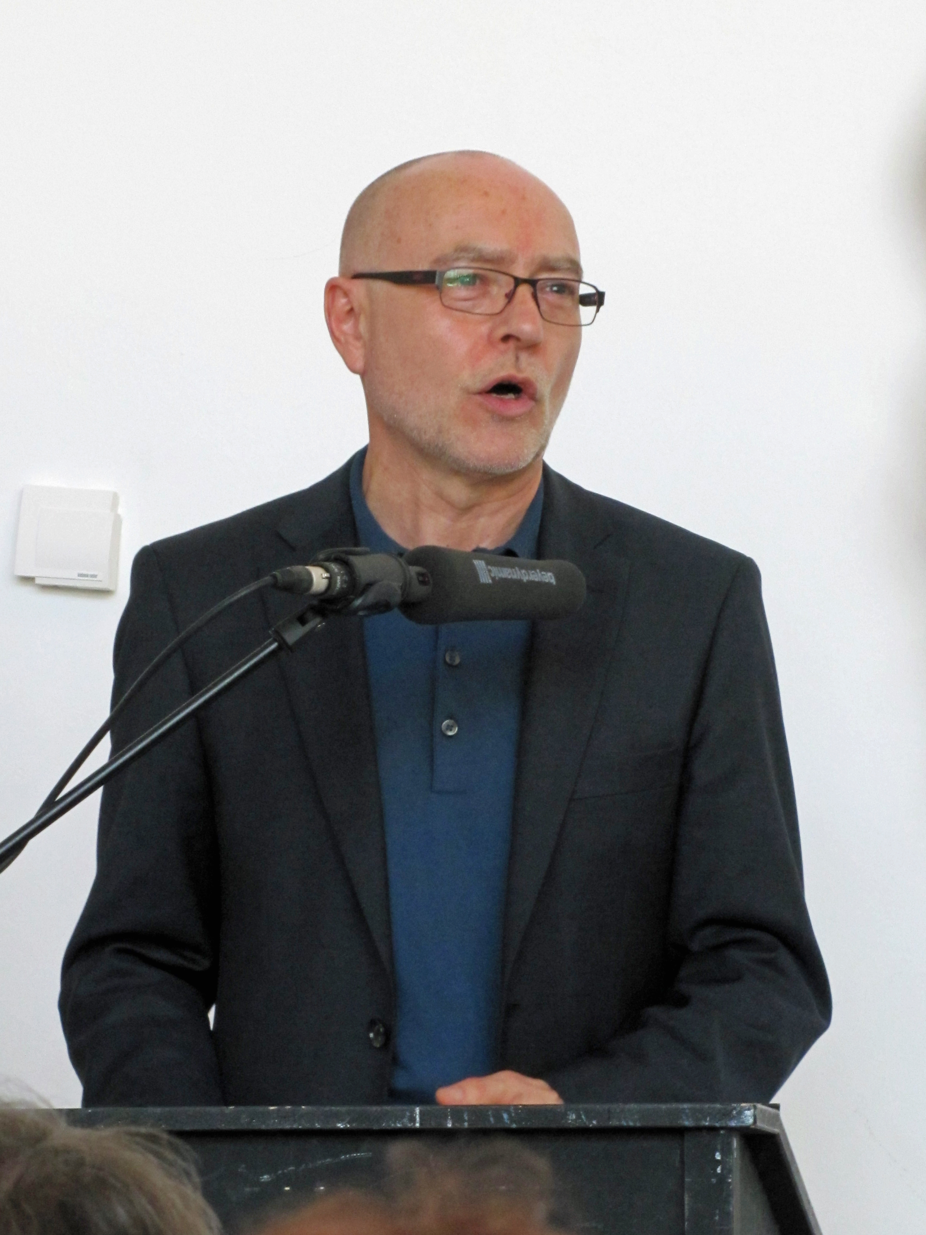 Udo Di Fabio, 2012 bei den Roemerberggespraechen in Ffm.